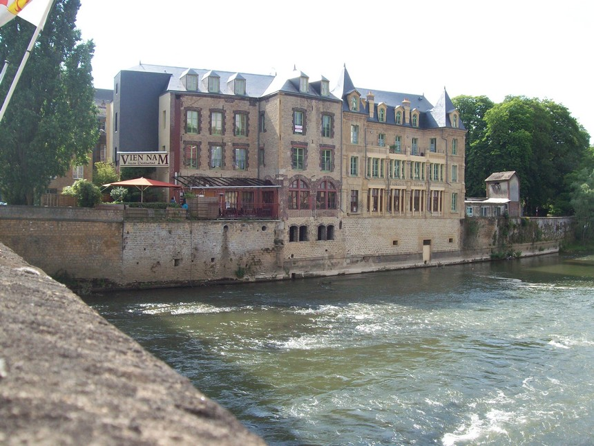 La Meuse à Sedan — Champagne-Ardenne, France